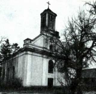 Касцёл Святых апосталаў Пятра і Паўла, Ізабелін